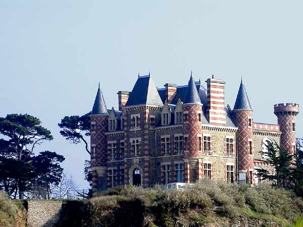 le chateau du Nessay entre le Béchet et la Salinette